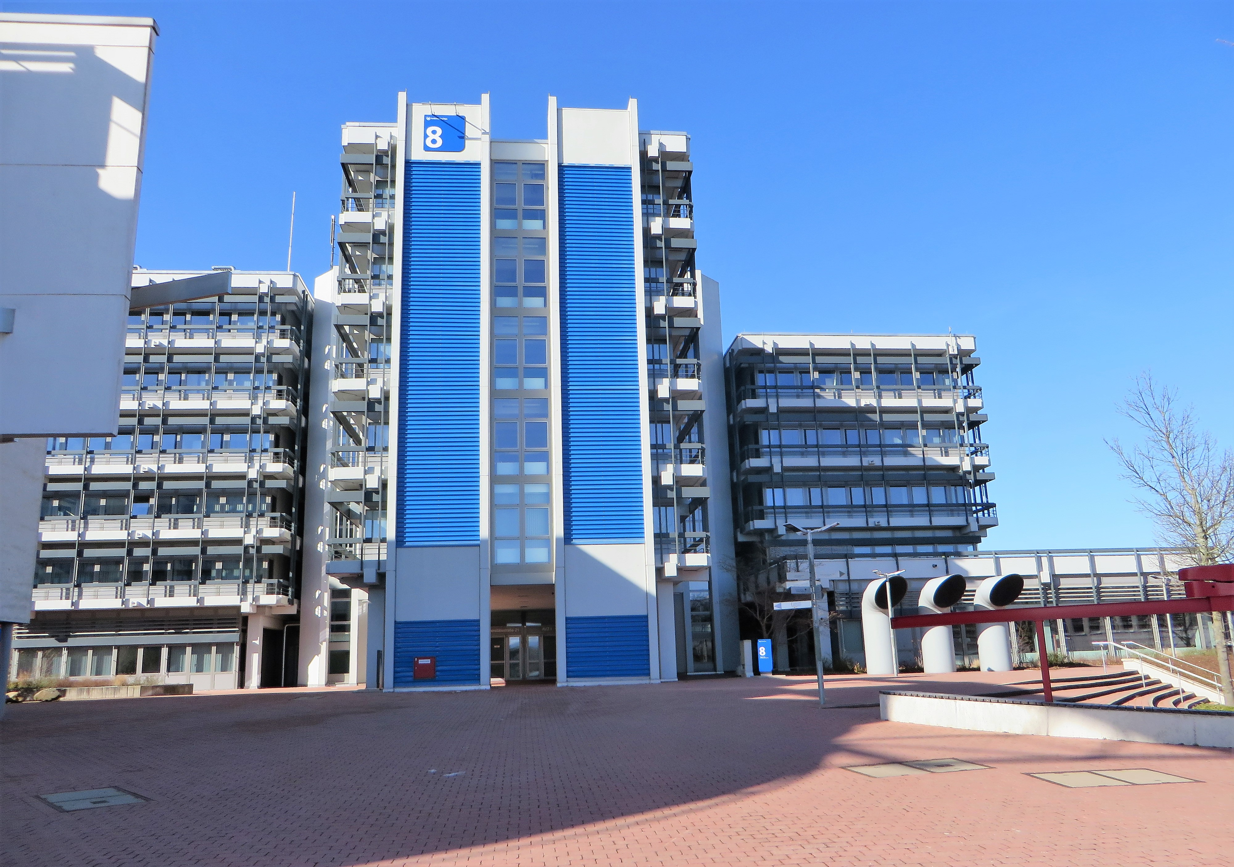 FernUniversität Hagen. Blick auf den Eingangsbereich des Allgemeinen Verfügungszentrums. Mit seiner Einweihung 1980 begann der Aufbau des FernUni-Campus. Das AVZ ist damit ein Symbol für die Idee vom universitären Fernstudium in Deutschland. Als einzige deutsche Fernuniversität vertritt die Hagener Hochschule diese Idee. Sie ist heute die mit Abstand größte deutsche Universität. Stellvertretend für die FernUniversität wurde das Gebäude „Nummer 8“, das AVZ, im Oktober 2018 als „Big Beautiful Building“ ausgezeichnet.